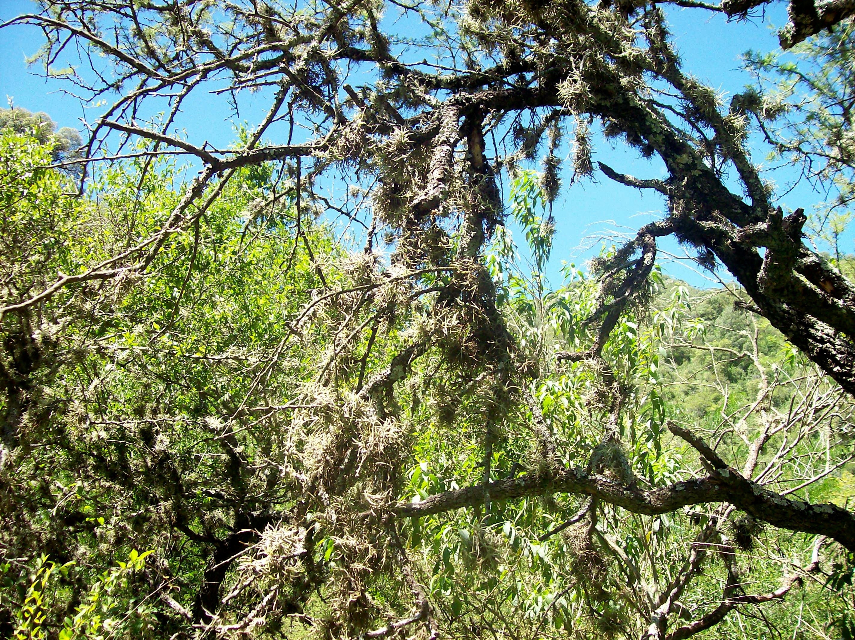 Claveles del aire, en Vaquerías, Valle Hermoso, pcia. de Córdoba, Argentina. Las coordenadas dadas son aproximadas, con (estimo) no más de 200 m de error de la posición correcta